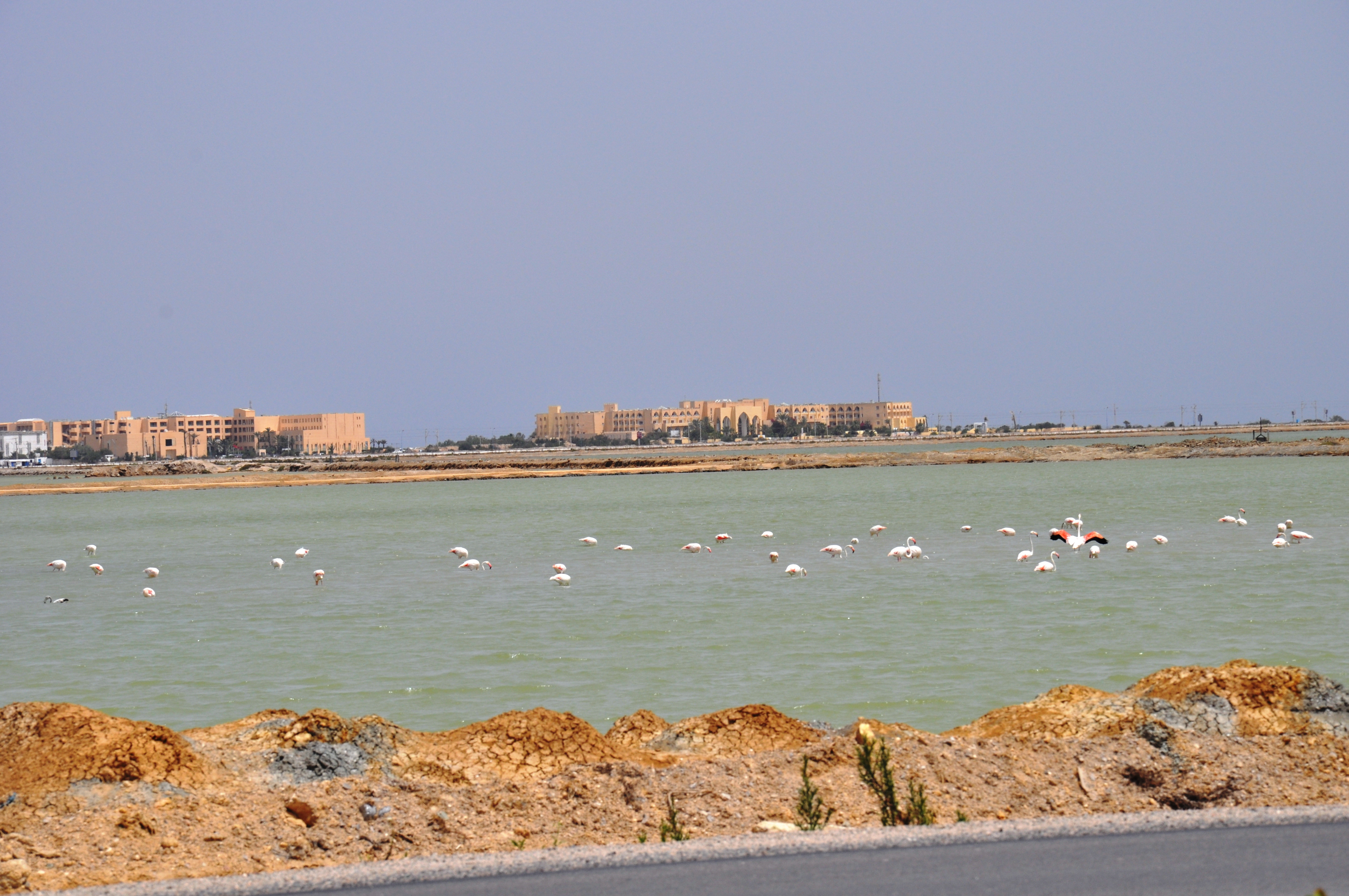 vue sur la route ourdanine